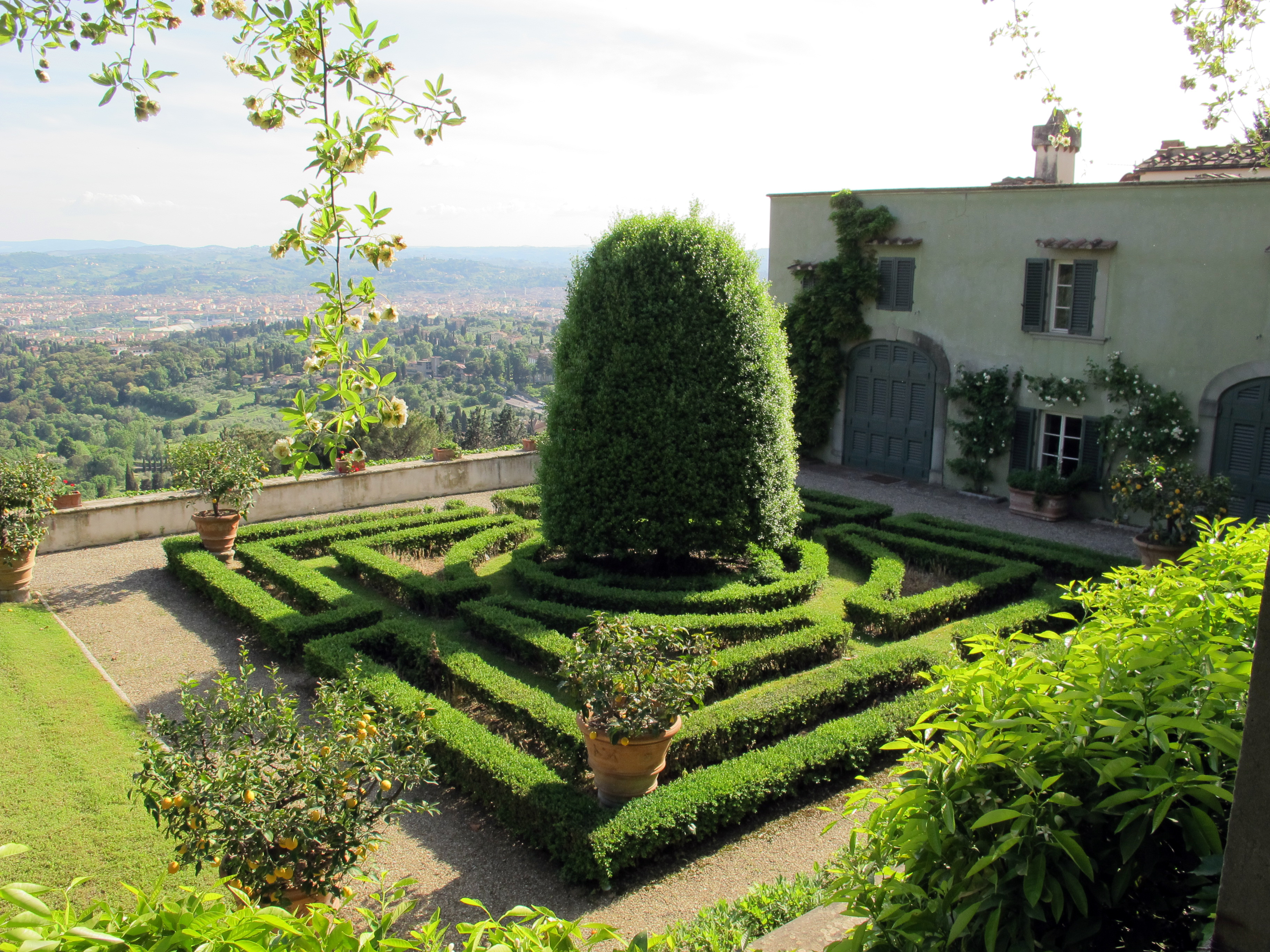 Villa medici di belcanto, terrazza inferiore